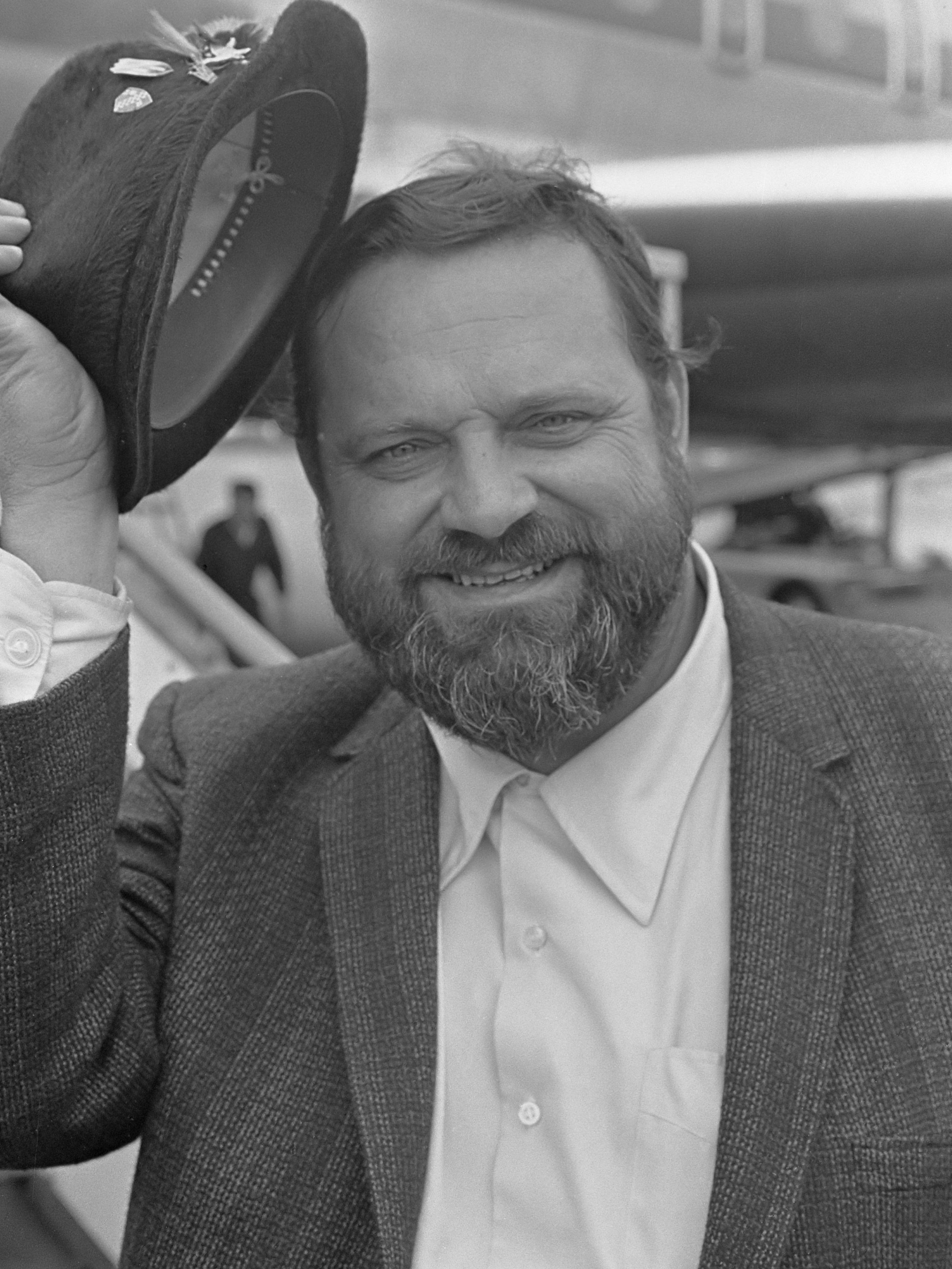 Amerikaanse trompetist en bandleider Al Hirt op Schiphol 28 september 1966